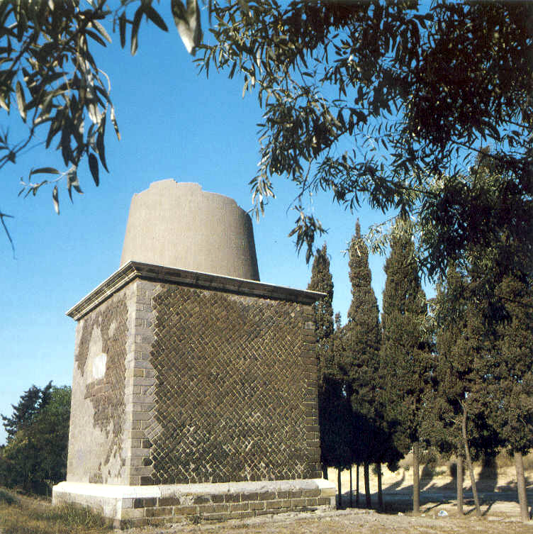 Torre Ciega. Monumento sepulcral de época romana en Cartagena (España)